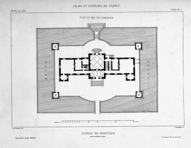 Plan du Château de Wideville